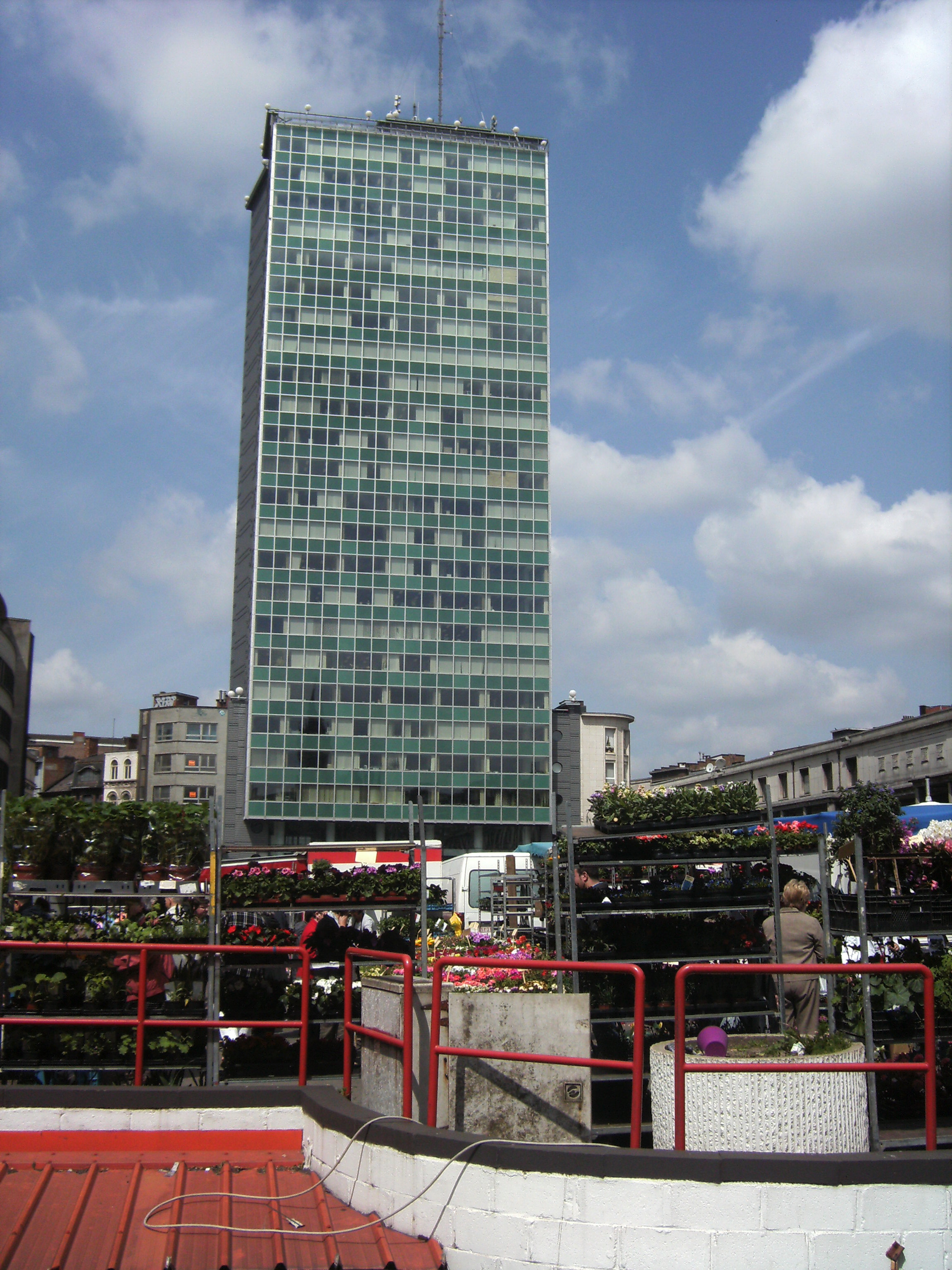 Centre Albert - Charleroi, place de la Ville basse.